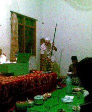 "TONGKAT SAYIDINA ALI YANG DIHADIAHKAN KEPADA RAKEAN SANCANG" yang berada di Kaum Pusaka (Yayasan Pusaka Muslimin, diketuai Ucep Jamhari) Cinunuk Garut